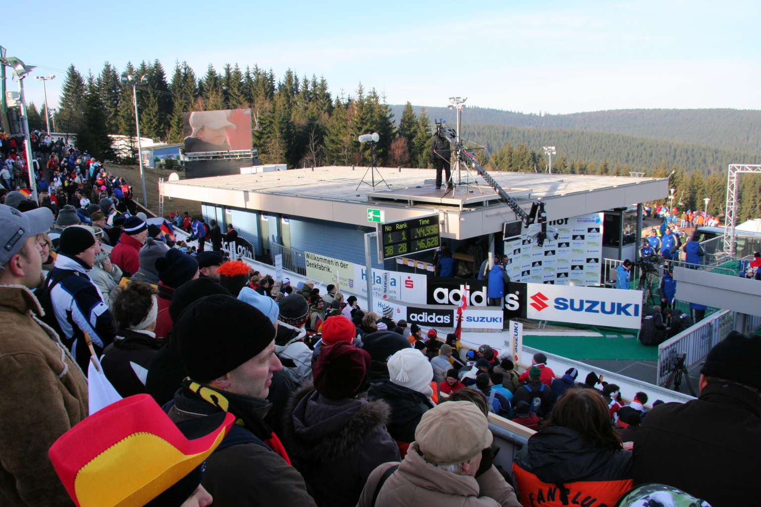 Ziel von Tribüne aus gesehen